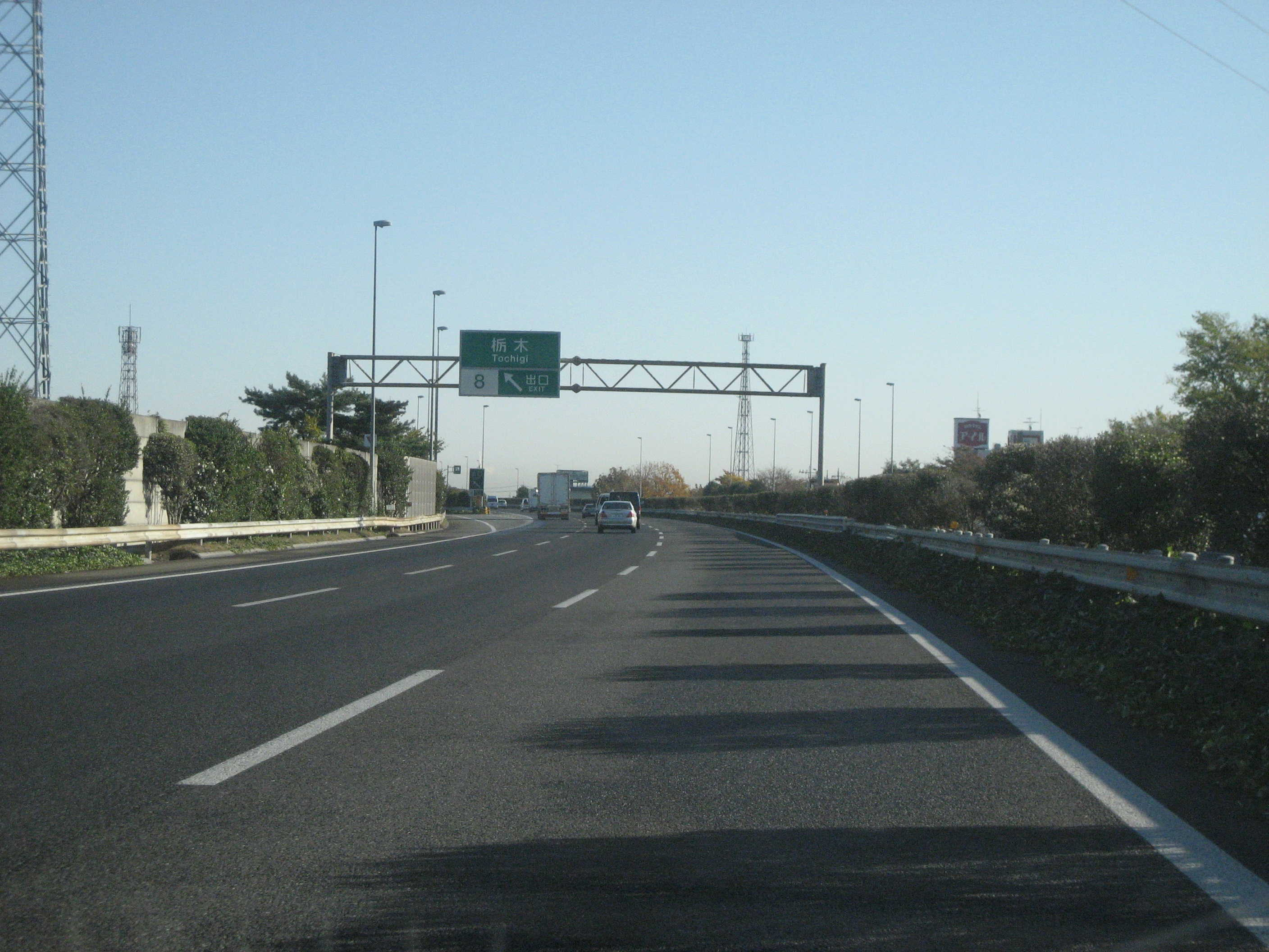 東北道栃木インター